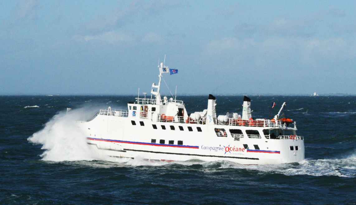 L'Acadie entre Belle-Île et Quiberon IMO Number: 7104269 Length: 42.65 m Beam: 10.11 m